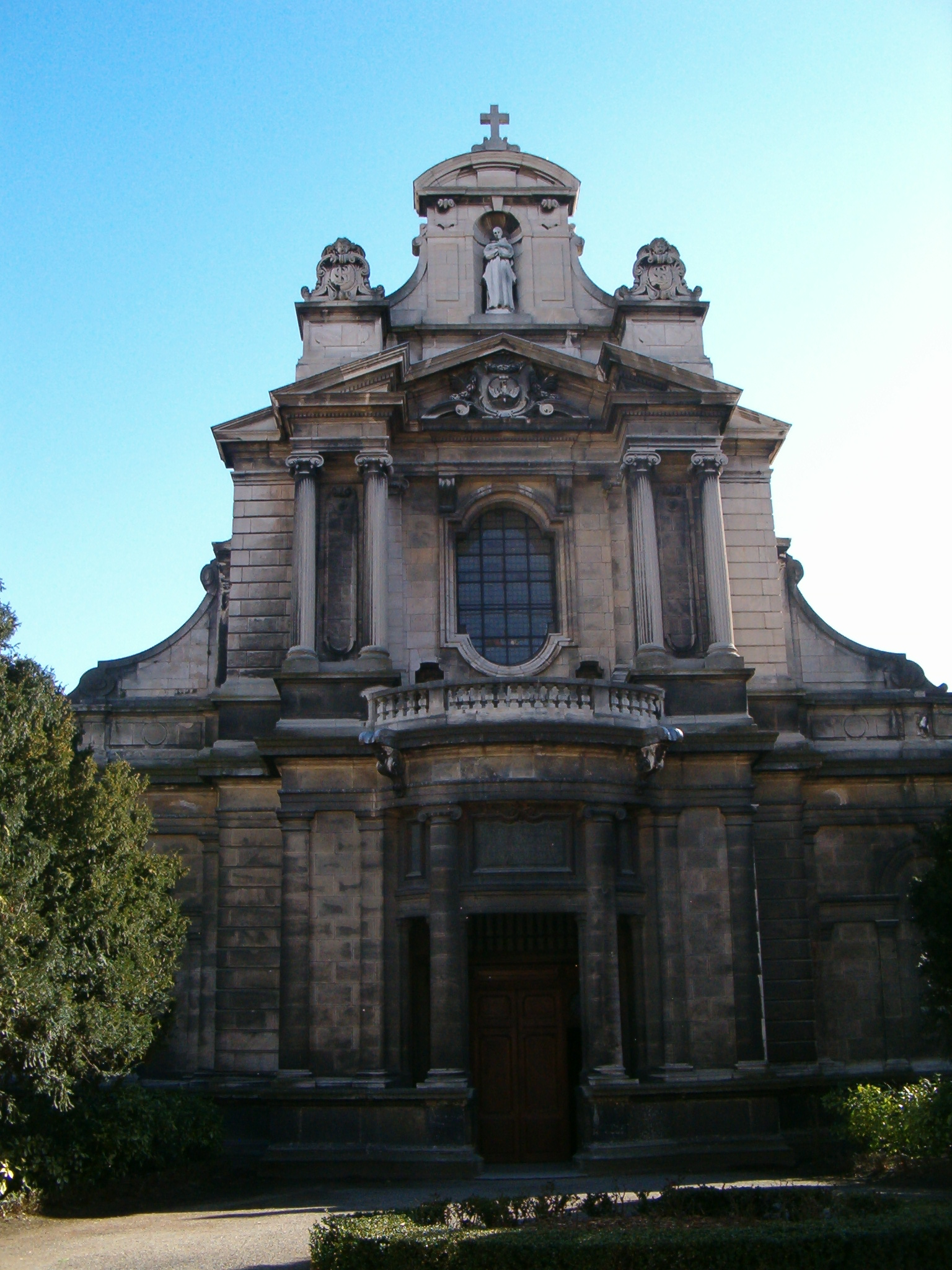 Façade de l'Eglise Saint-Bruno des Chartreux, Lyon, France